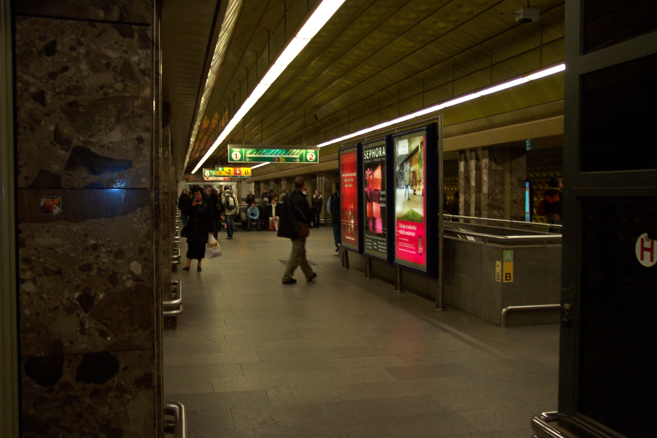 Metro station Můstek - Stanice metra Můstek